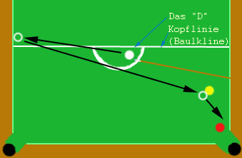 Kopffeld beim Snooker (Baulk-Area)